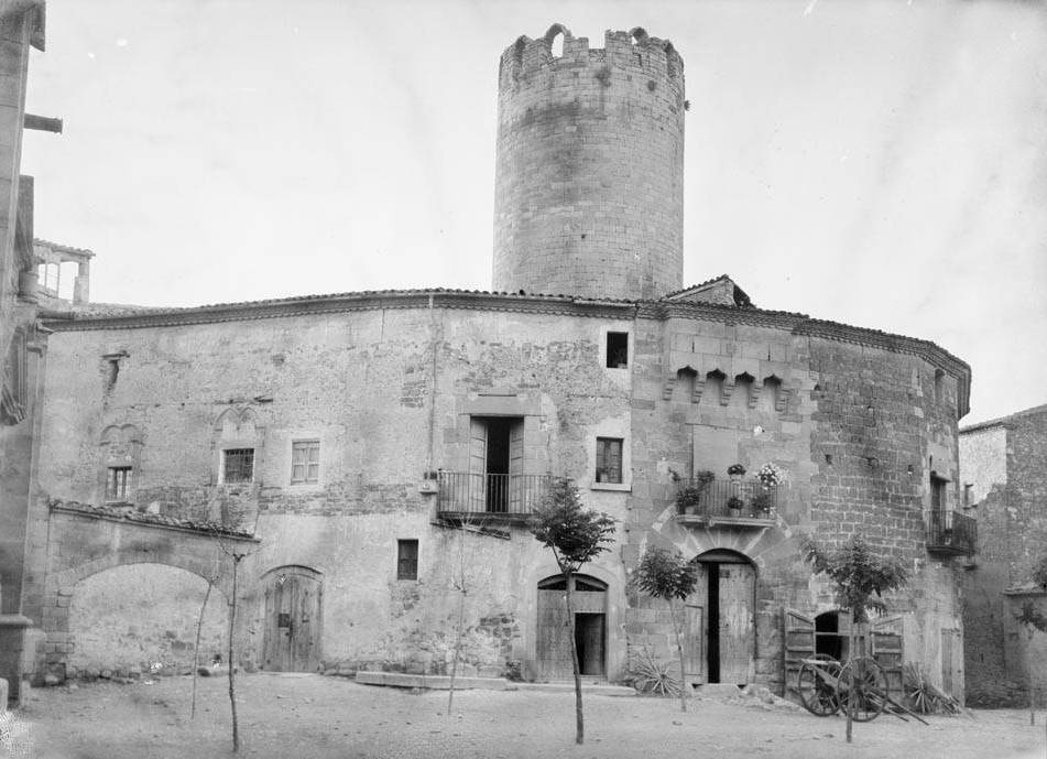 Imatge